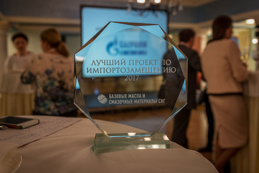 Премия "Производство базовых масел и смазочных материалов в России и СНГ" в номинации "Импортозамещение"